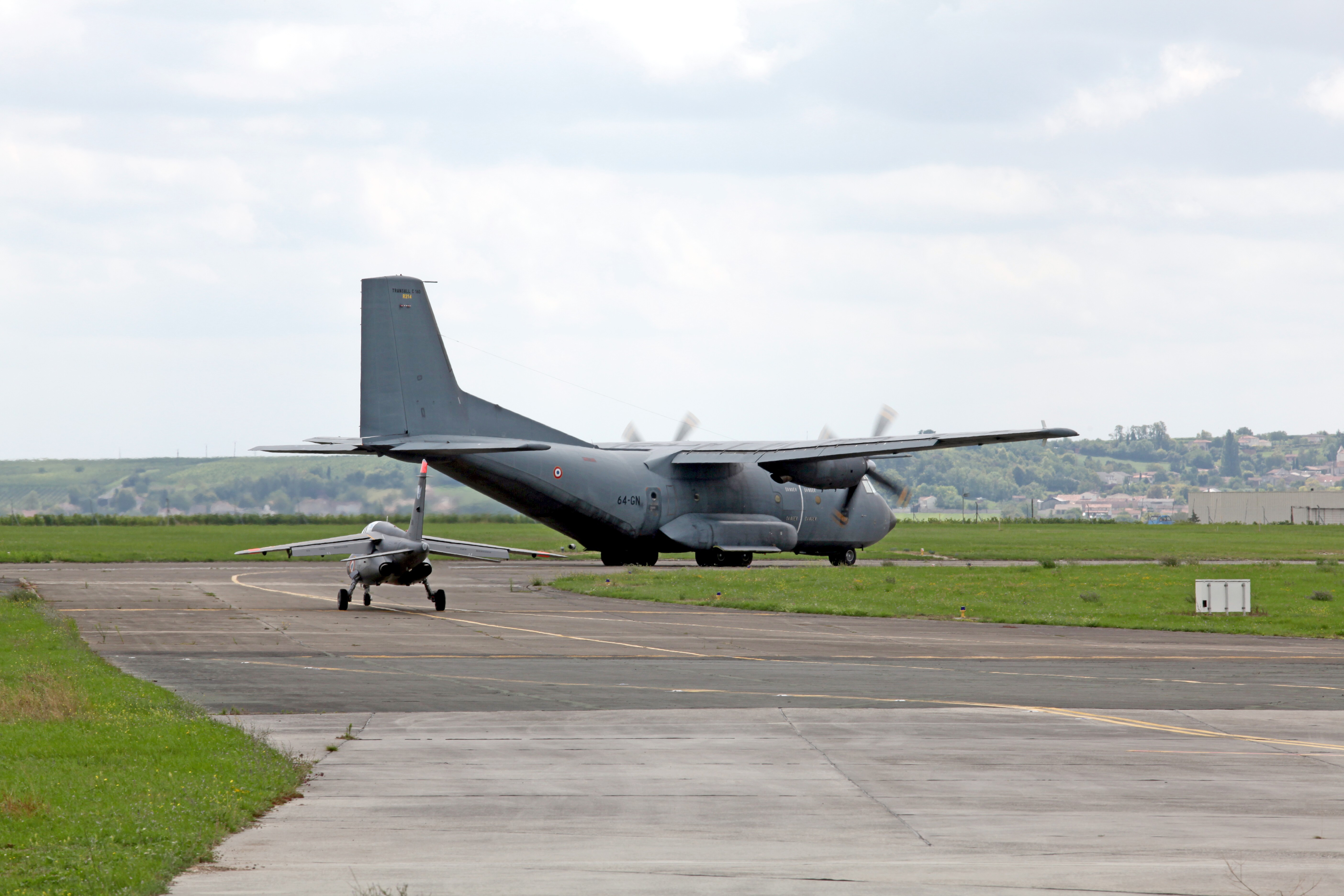 Un Transall C 160 NG R - R214/64-GN - de l'Escadron de transport 1/64 Béarn sur la piste de décollage, un Alfa Jet en attente devant lui.